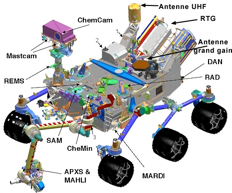 Schéma de Mars Science Laboratory